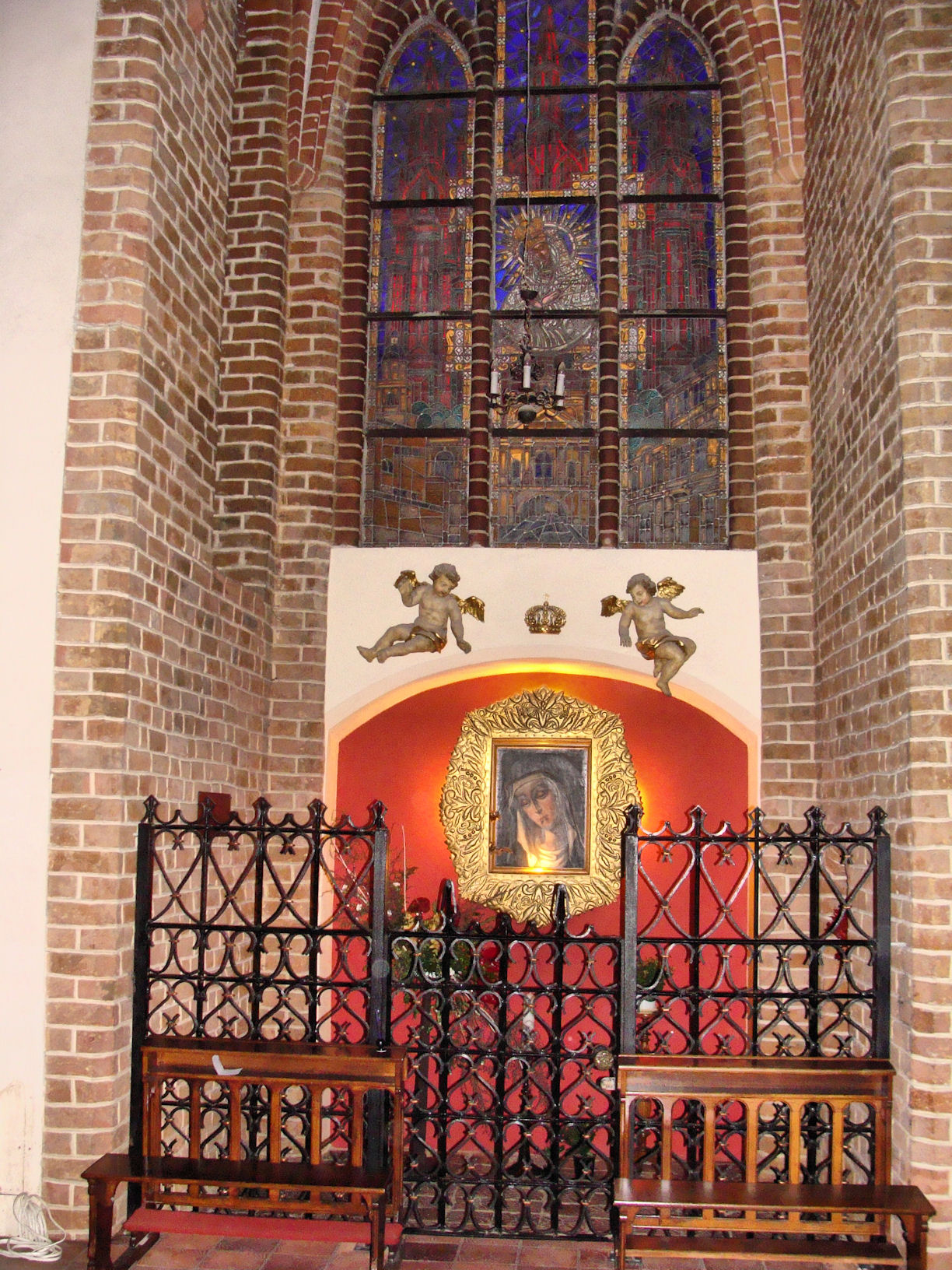 Bazylika Archikatedralna w Szczecinie